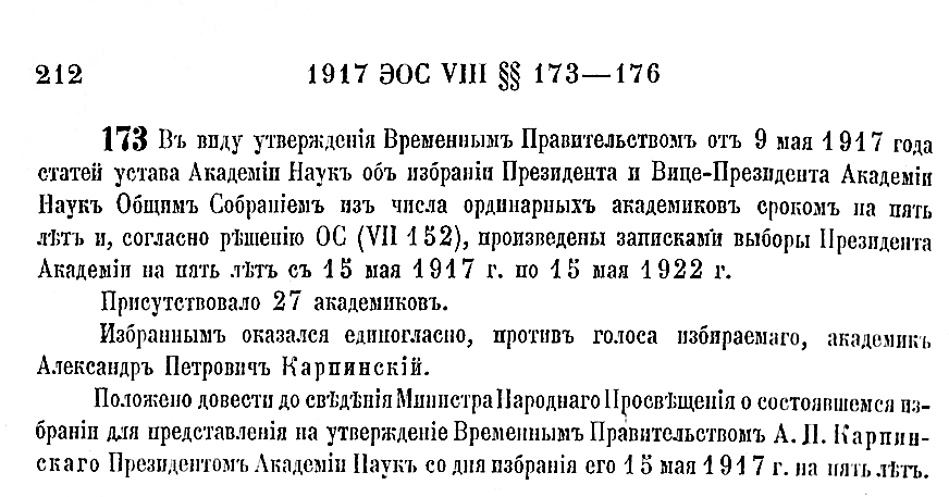 О избрании А. П. Карпинского президентом Российской академии наук: § 173. 8 заседание, 15 (28 по новому стилю) мая 1917 г. // Протоколы Экстраординарного Общего собрания Российской академии наук. СПбФ: РАН, 1917. С. 212.